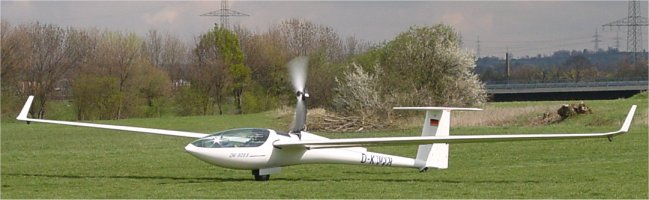 Planeur DG-808B du fabricant DG Flugzeugbau